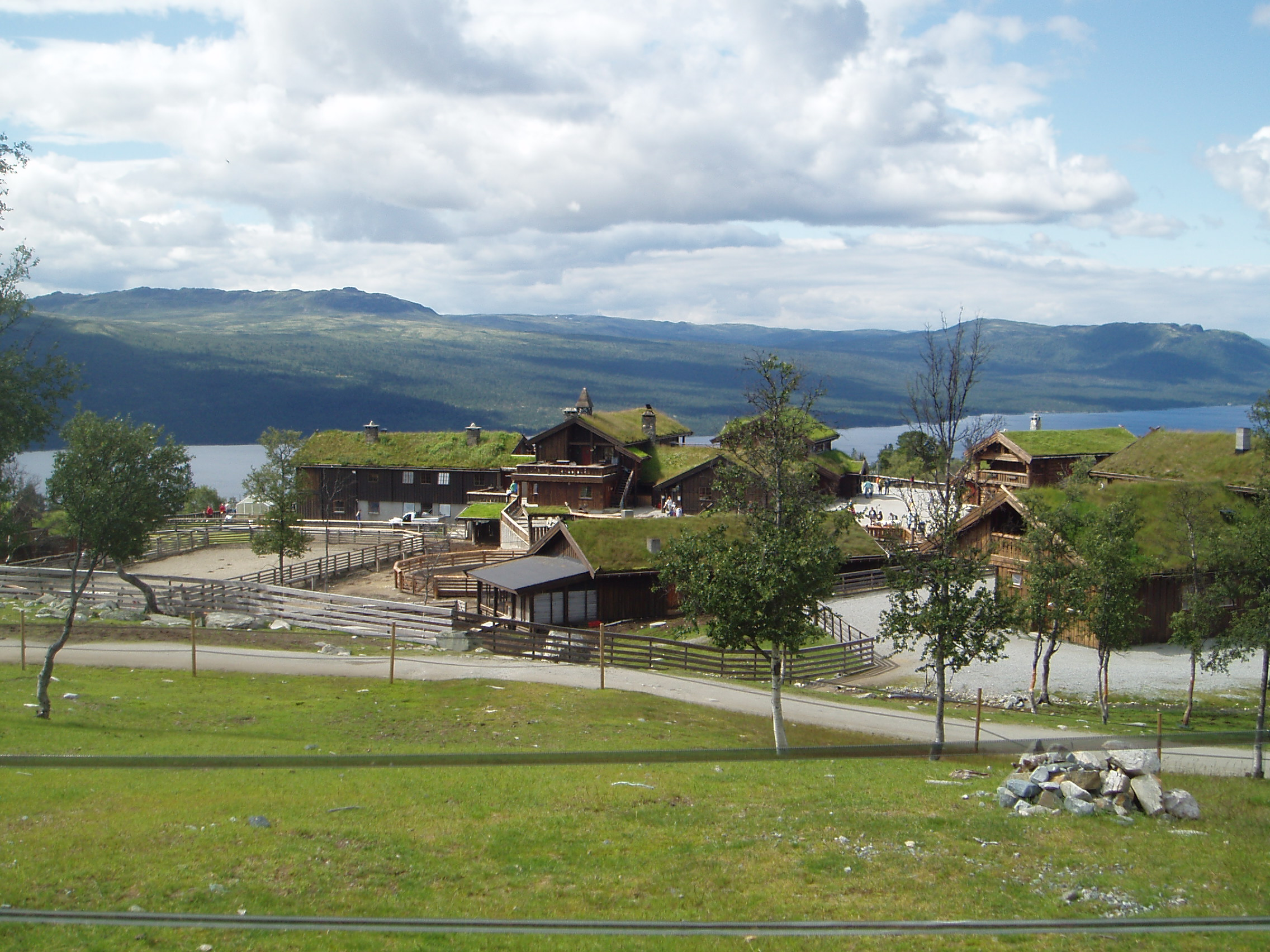 Langedrag Naturpark in Norway.